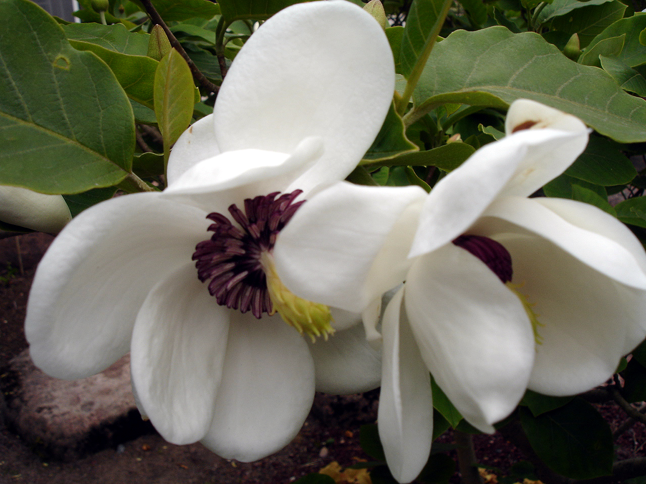 Magnolia sieboldii